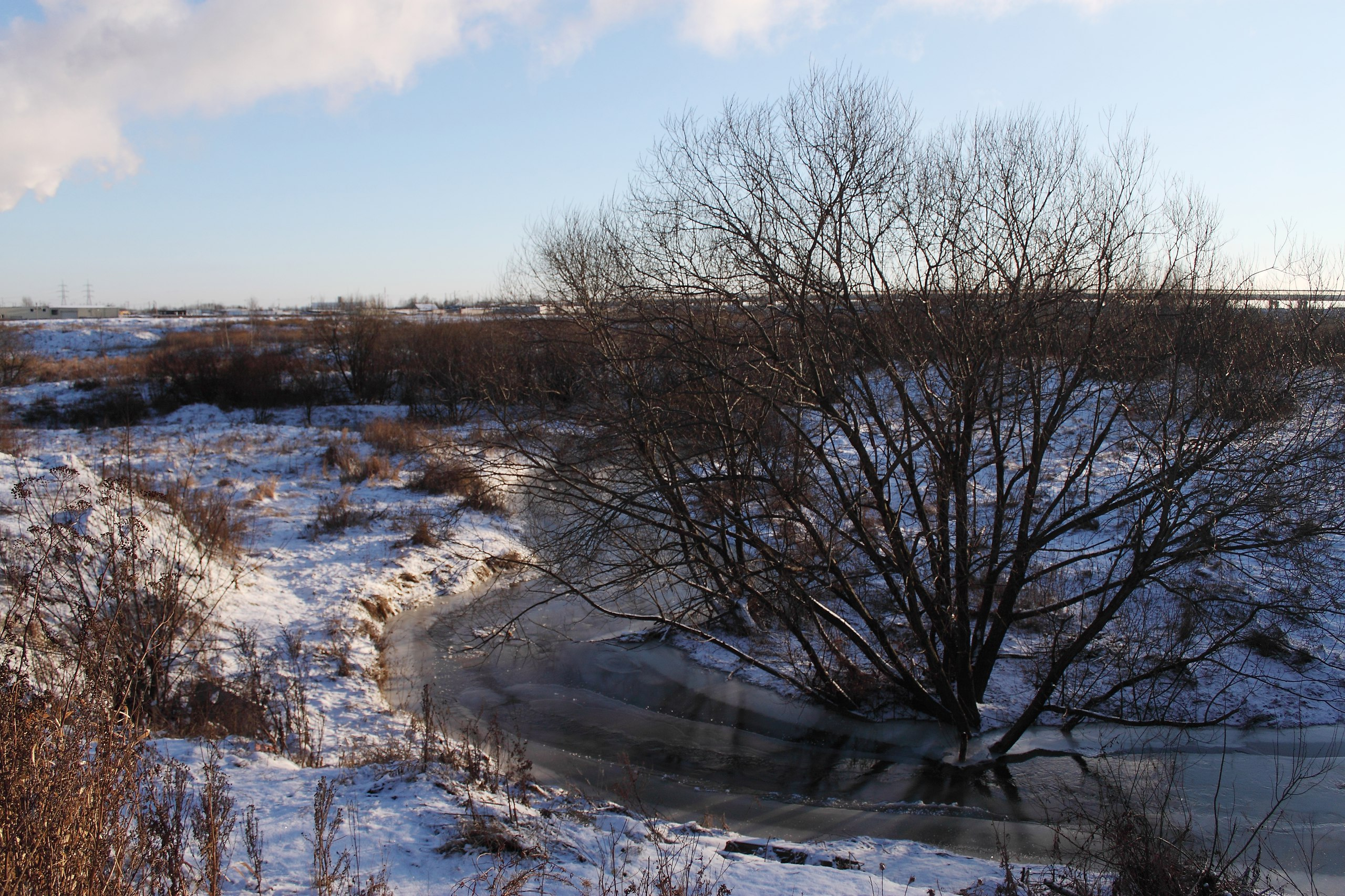 Волковка - южный приток Невы. Район Купчино.